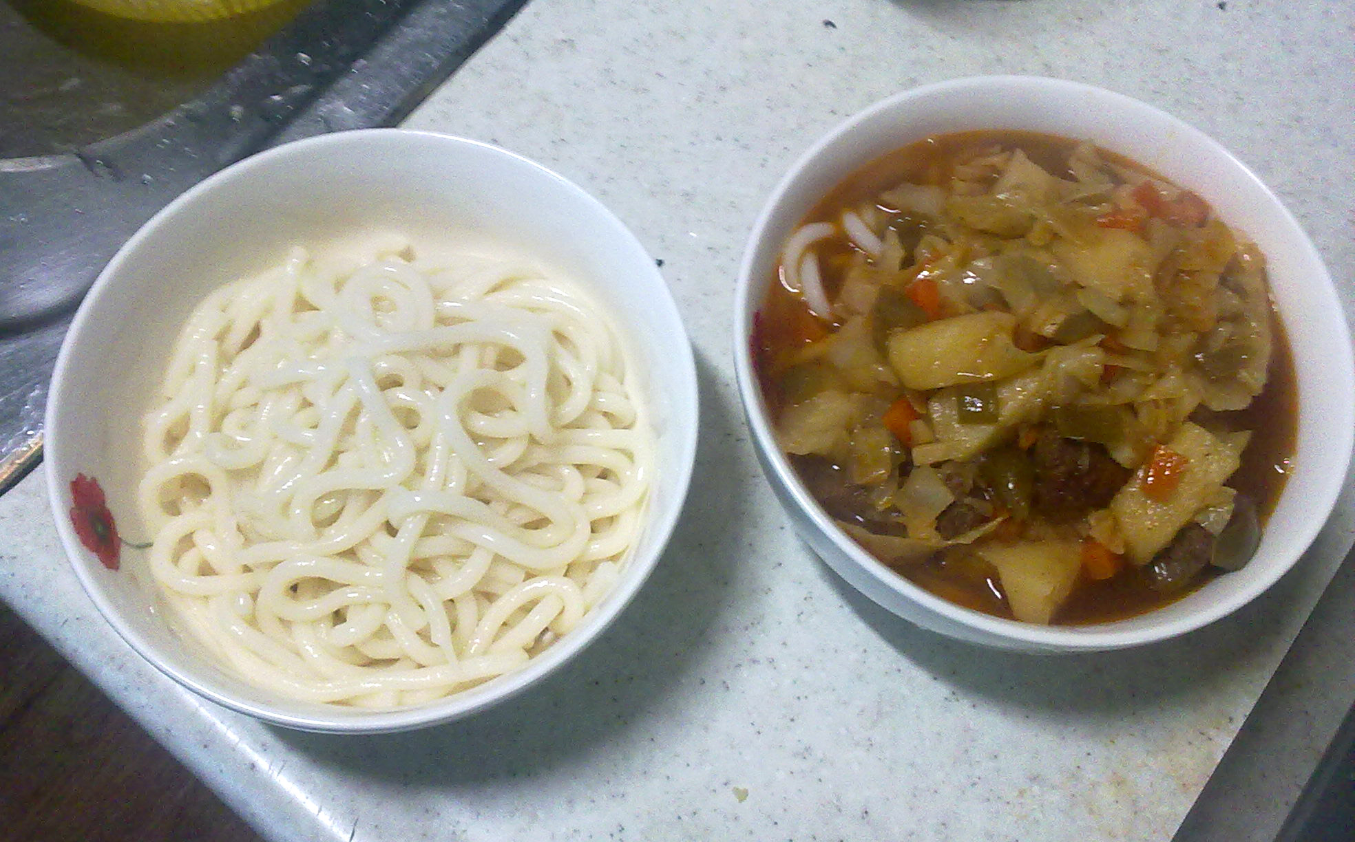 Лагманная лапша и готовый лагман с подливой